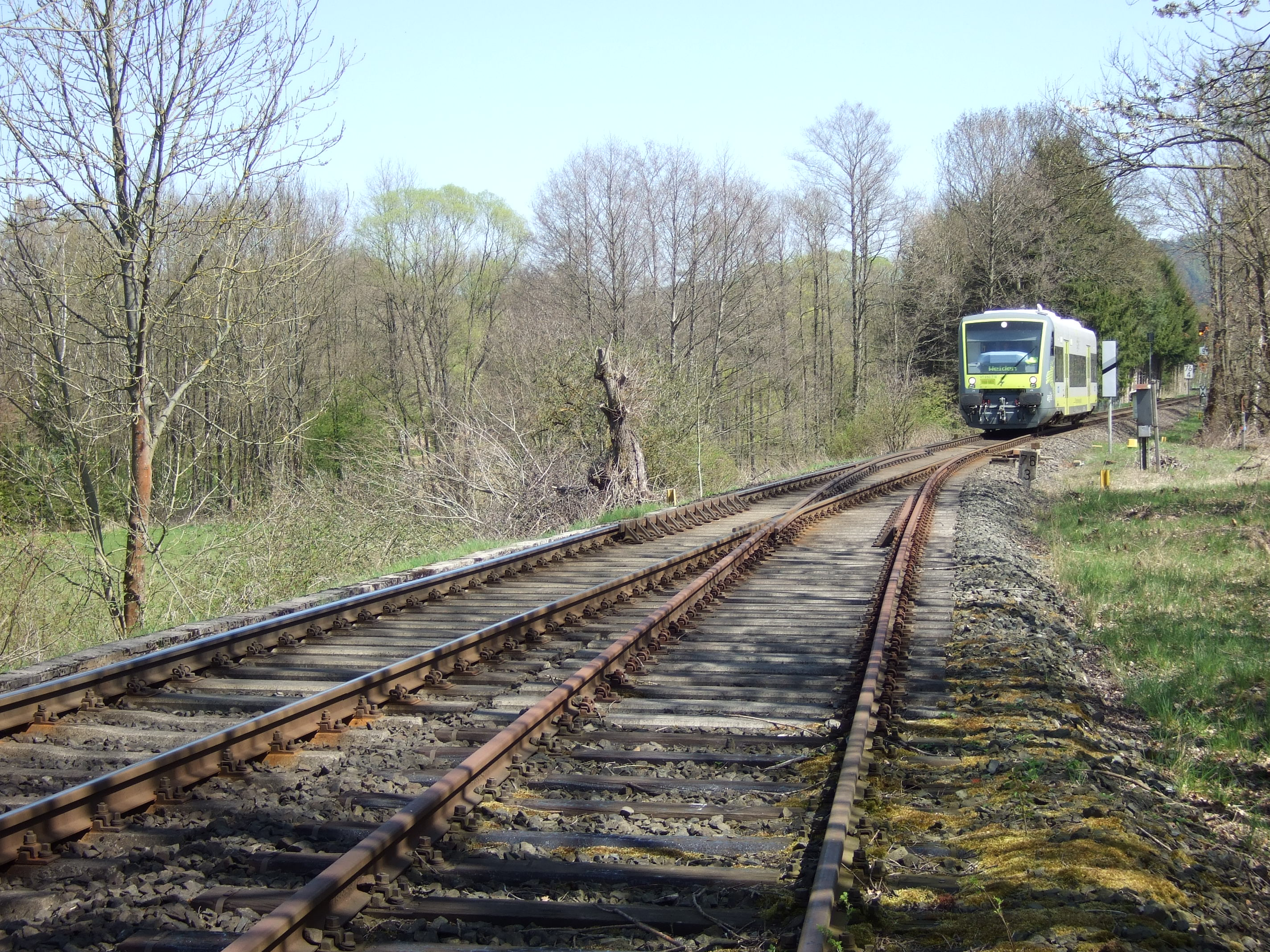 Abzweig Schlömen 2012